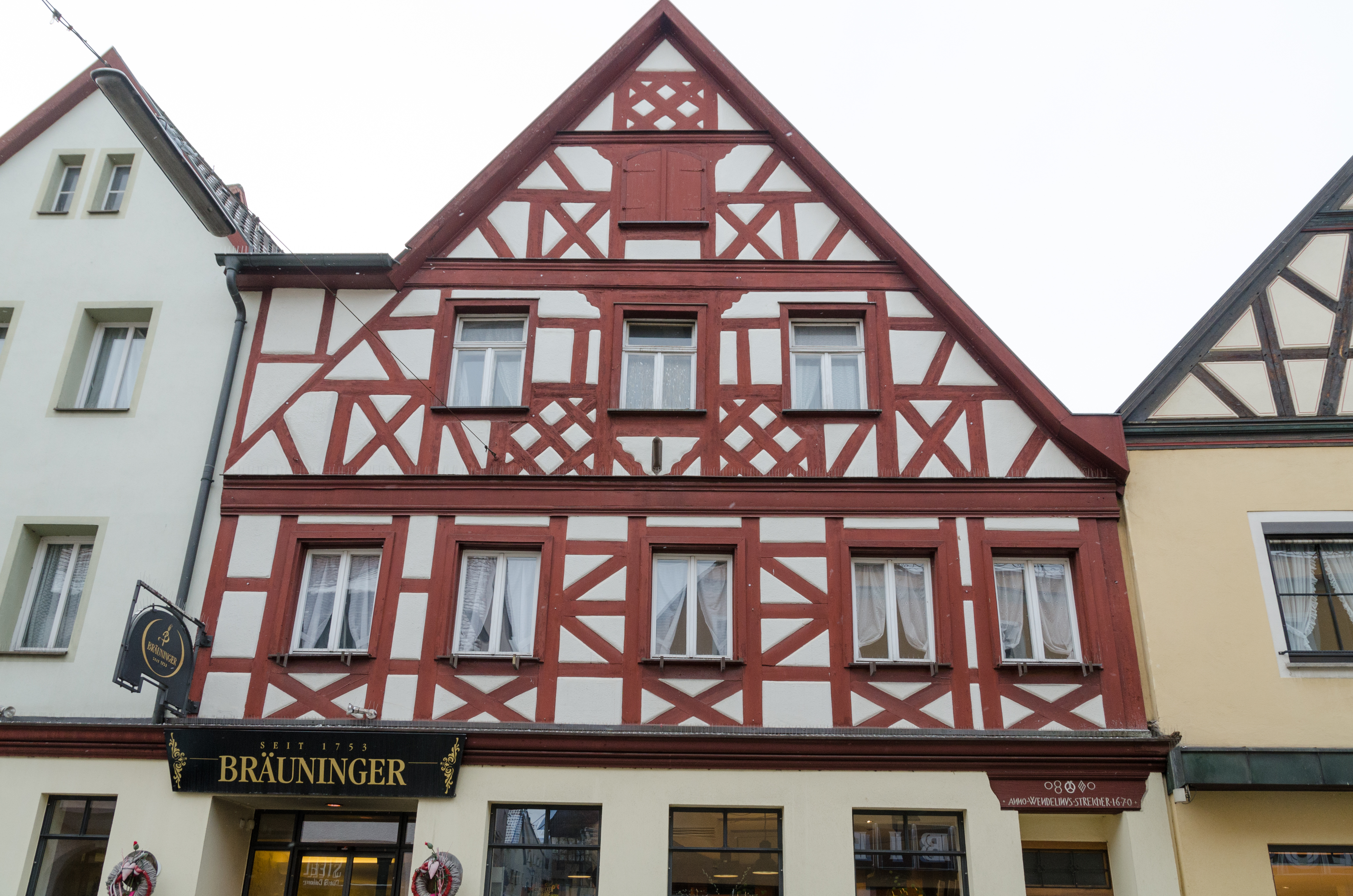 Neustadt an der Aisch, Bamberger Straße 7